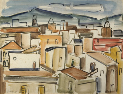 Photographie d'une aquarelle réalisée par Yvonne Guégan